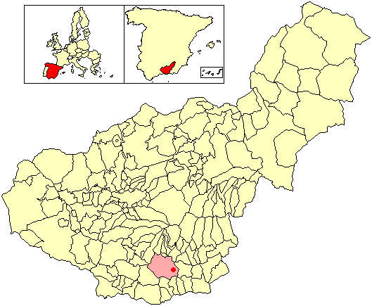 Situación de la localidad de Alcázar (en el municipio de Órgiva) respecto a la provincia de Granada, en España.